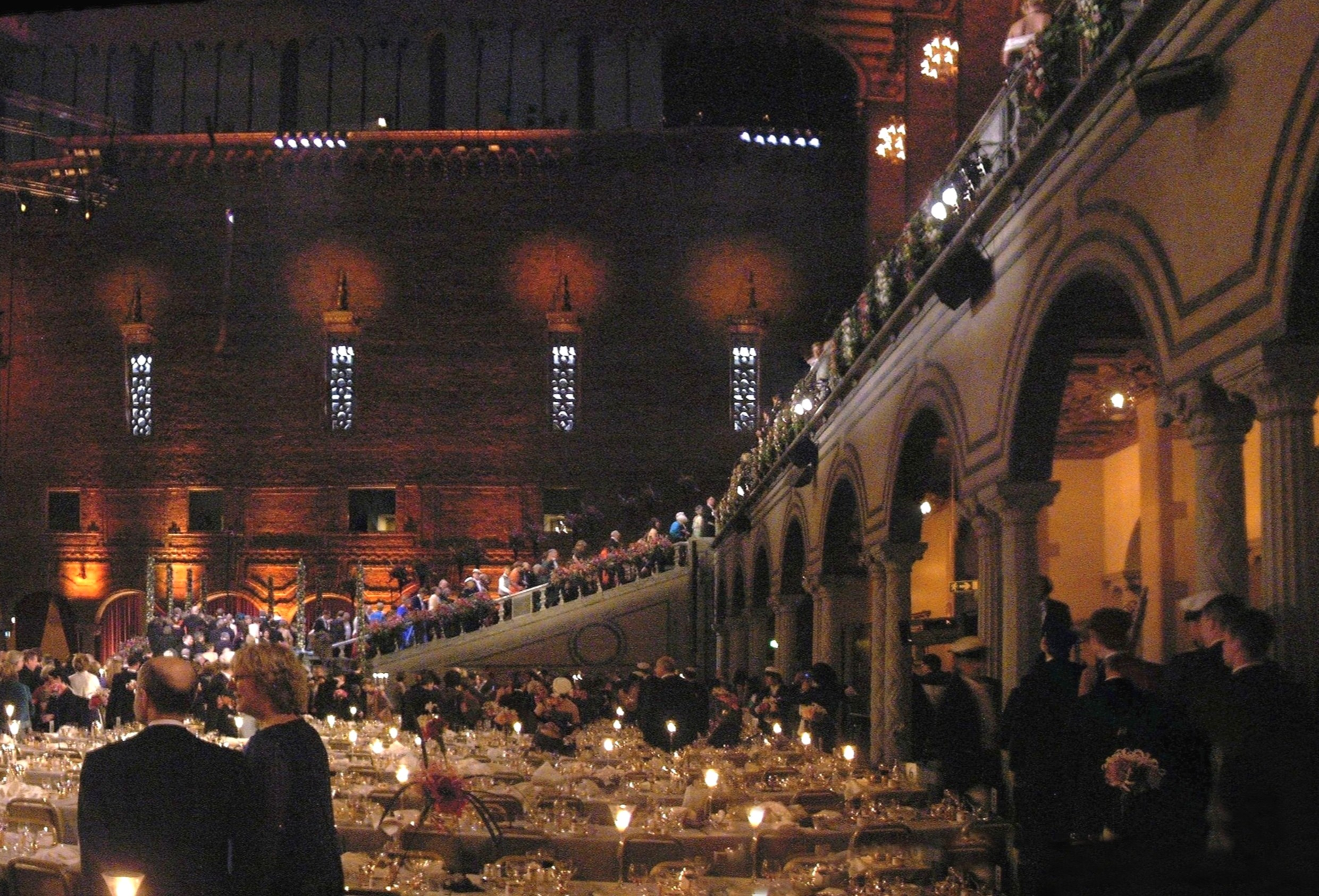 Nobelfesten 2005